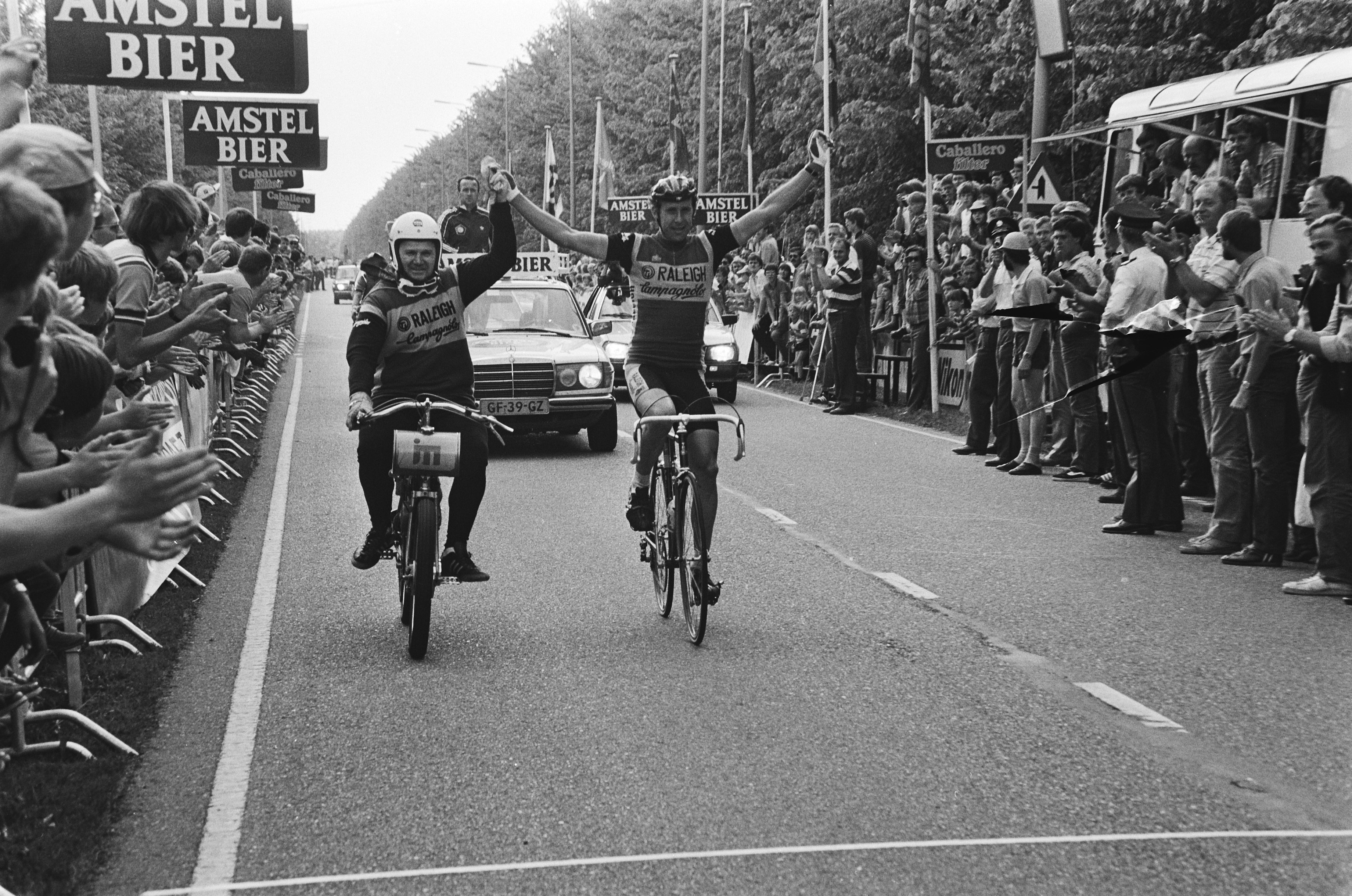 Collectie / Archief : Fotocollectie Anefo Reportage / Serie : [ onbekend ] Beschrijving : Zuiderzee Derny Tour , 307 km verreden; Ludo Peeters (Belgie, r.) met zijn gangmaker over de finishstreep Datum : 29 mei 1982 Trefwoorden : dernies, sport, wielrennen Persoonsnaam : Peeters Ludo, Zuiderzee Derny Tour Fotograaf : Dijk, Hans van / Anefo Auteursrechthebbende : Nationaal Archief Materiaalsoort : Negatief (zwart/wit) Nummer archiefinventaris : bekijk toegang 2.24.01.05 Bestanddeelnummer : 932-1882